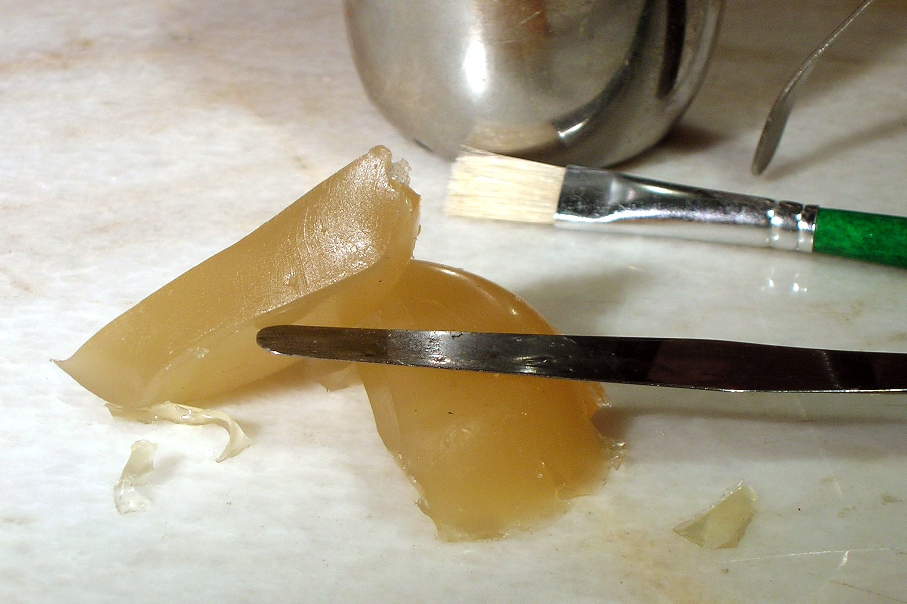 Hide glue at room temperature